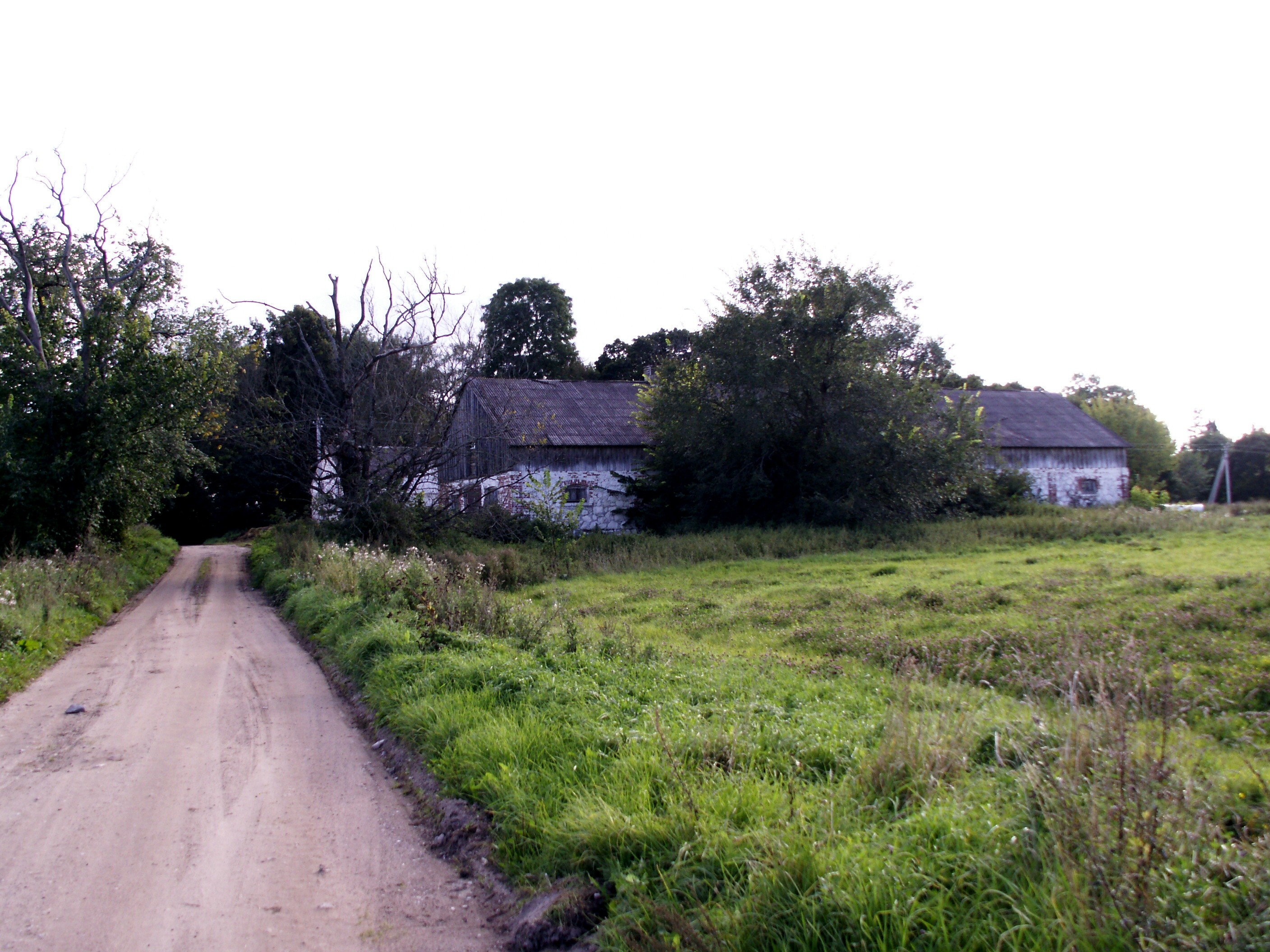 Lapkasiai, Biržiškų dvaras, Šiaulių rajonas, Lietuva